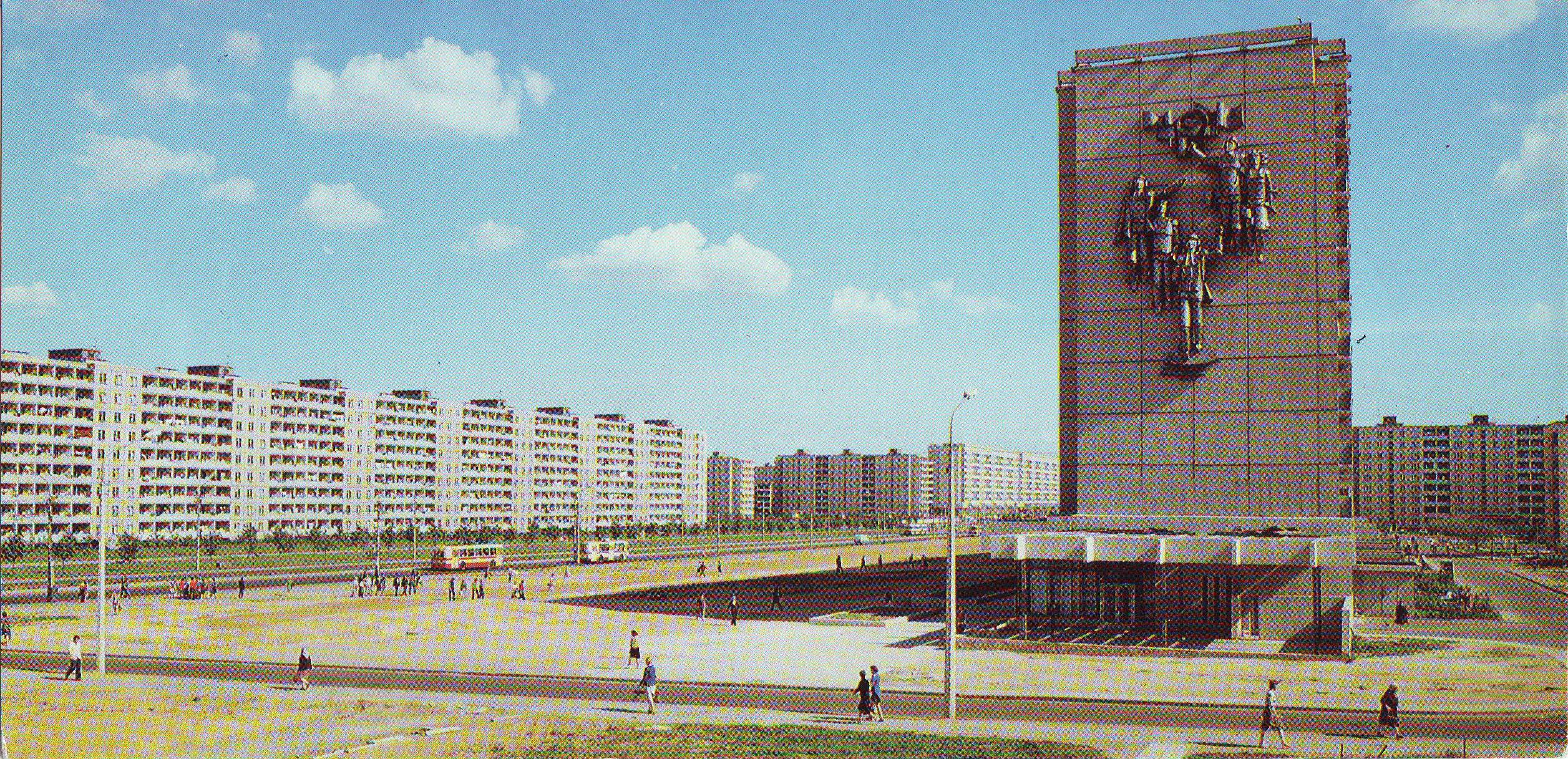 Почтовая открытка БССР. Минск, проспект Рокоссовского. 1983 год.